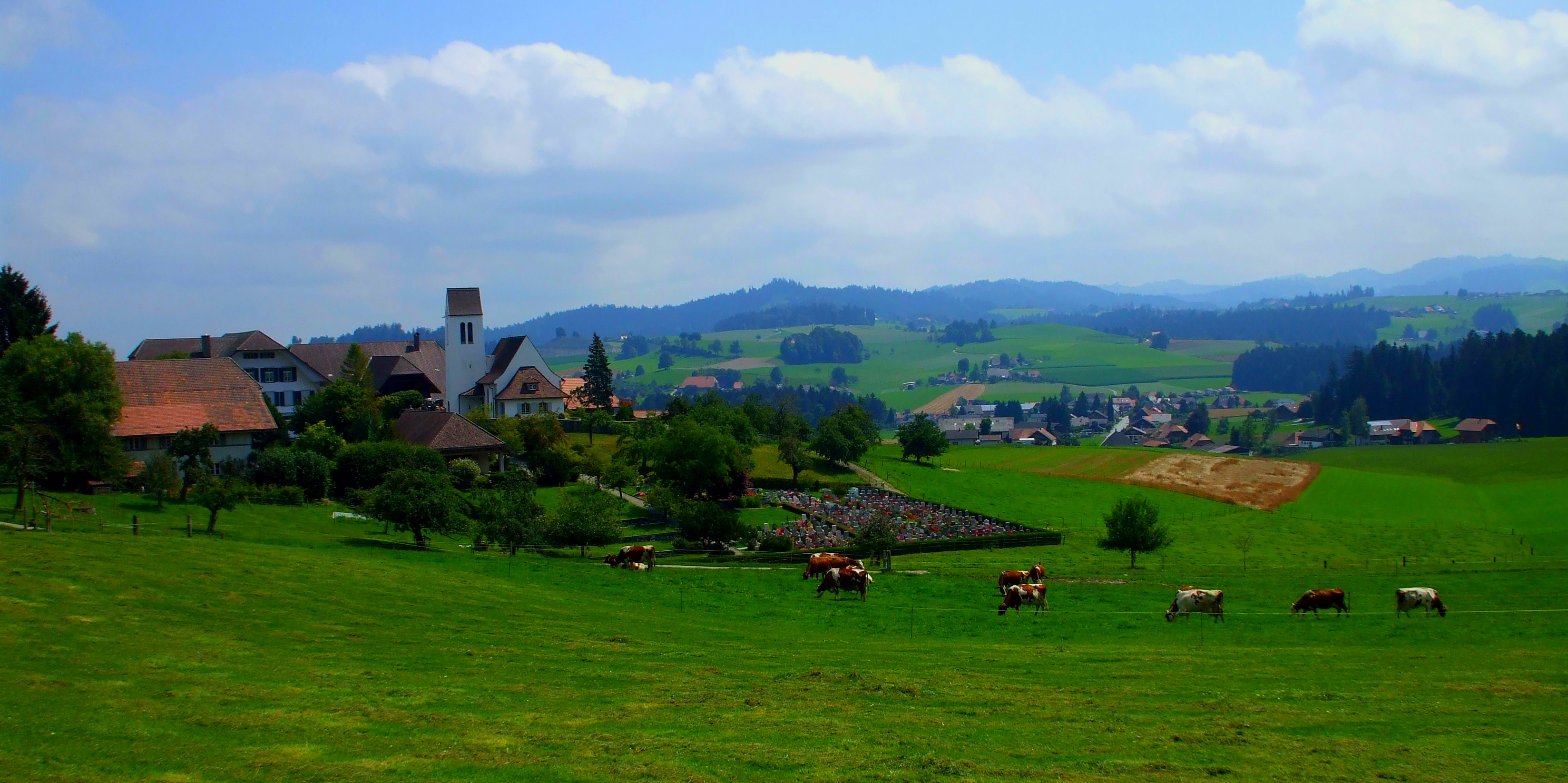 Landschaftsbild von Affoltern im Emmental, Schweiz